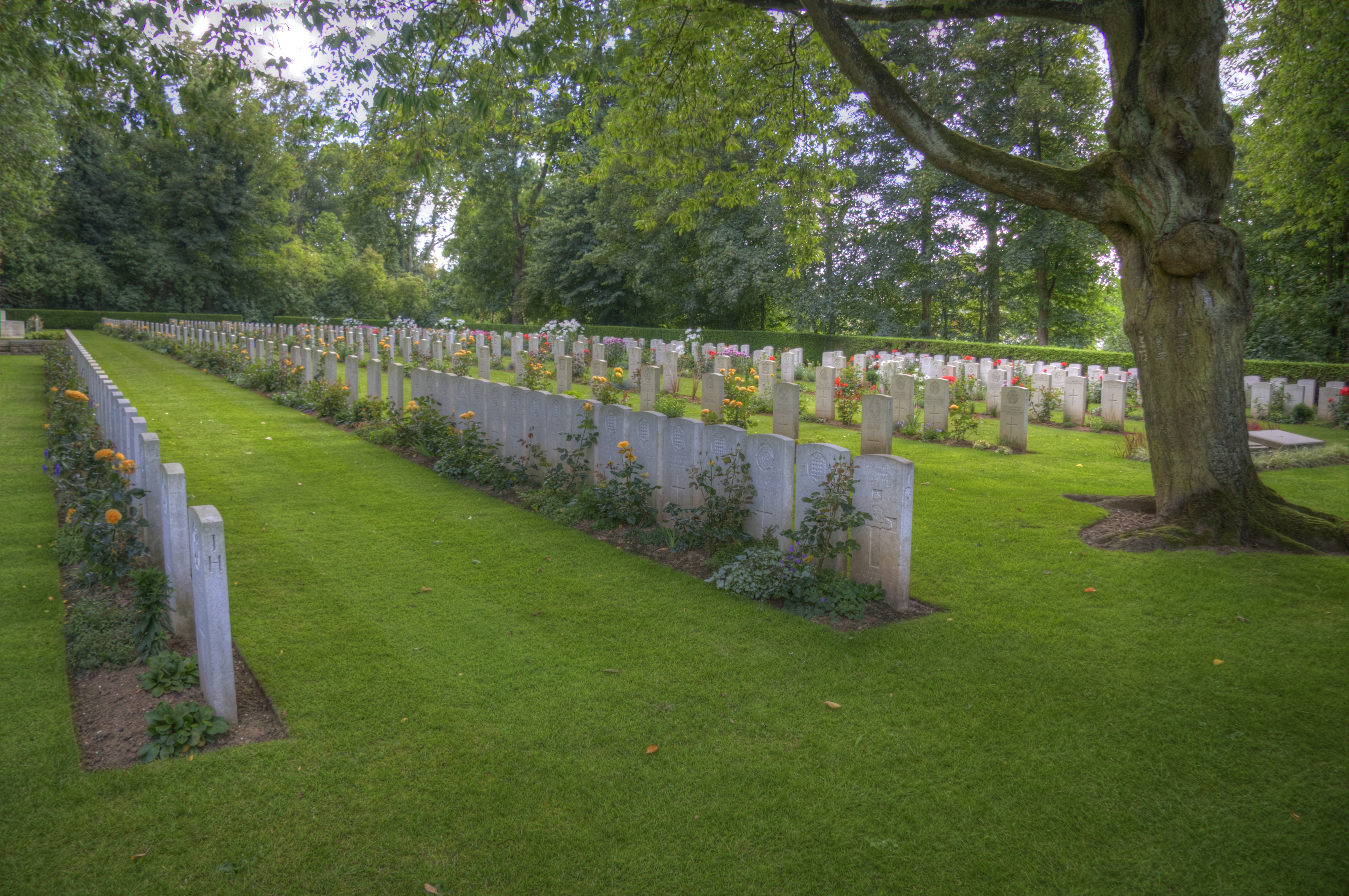 Le cimetière Anglais de Agny